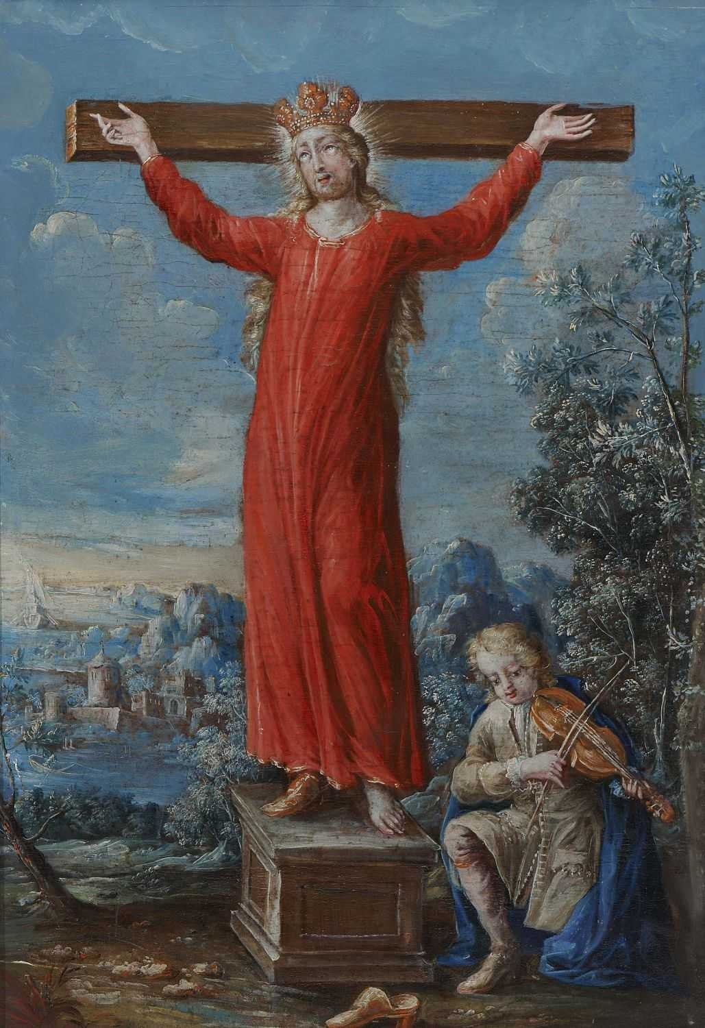 Süddeutsch, 18. Jh., Hl. Kümmernis. Öl auf Lwd. 78 x 54 cm